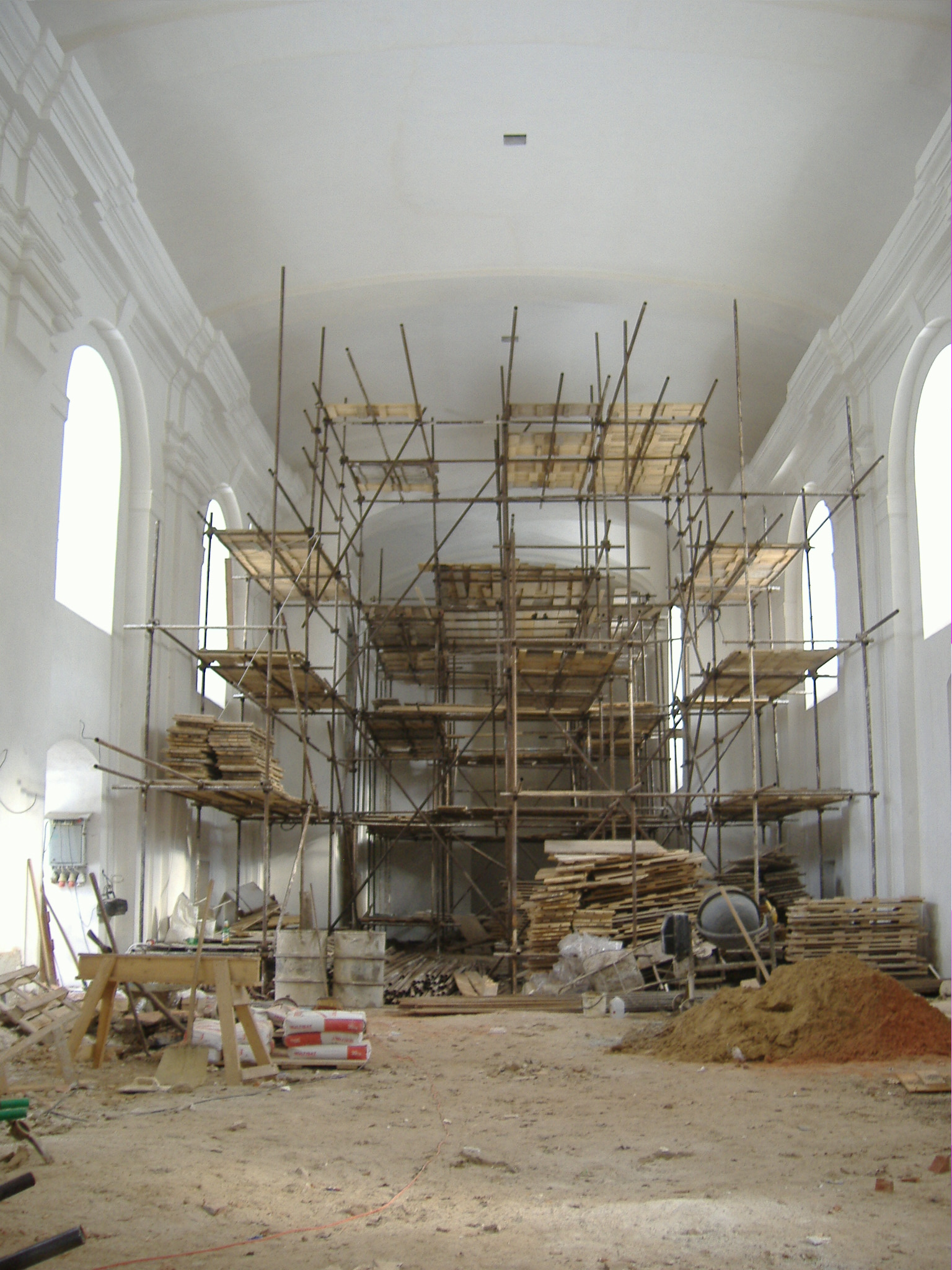 Kostel svatého Martina, Markvartice (okres Děčín).